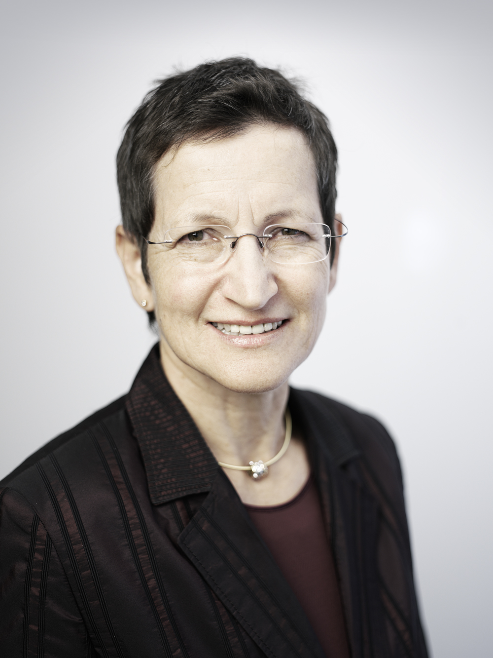 Das Mitglied der Vorarlberger Landesregierung Greti Schmid